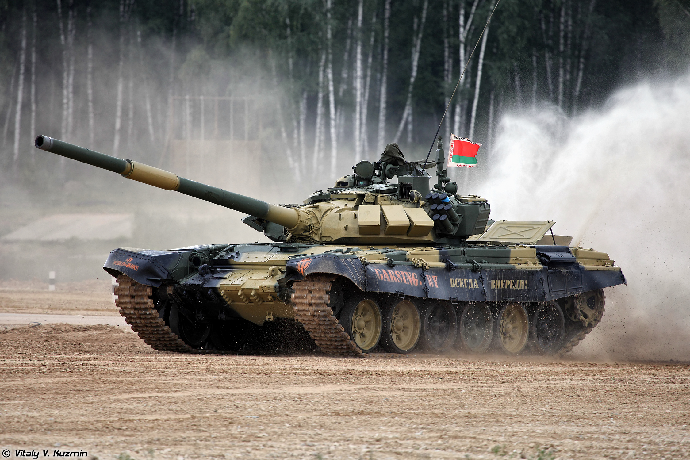 Танк Т-72БМ1 команды Республики Беларусь (T-72BM1 tank of Belarus team)